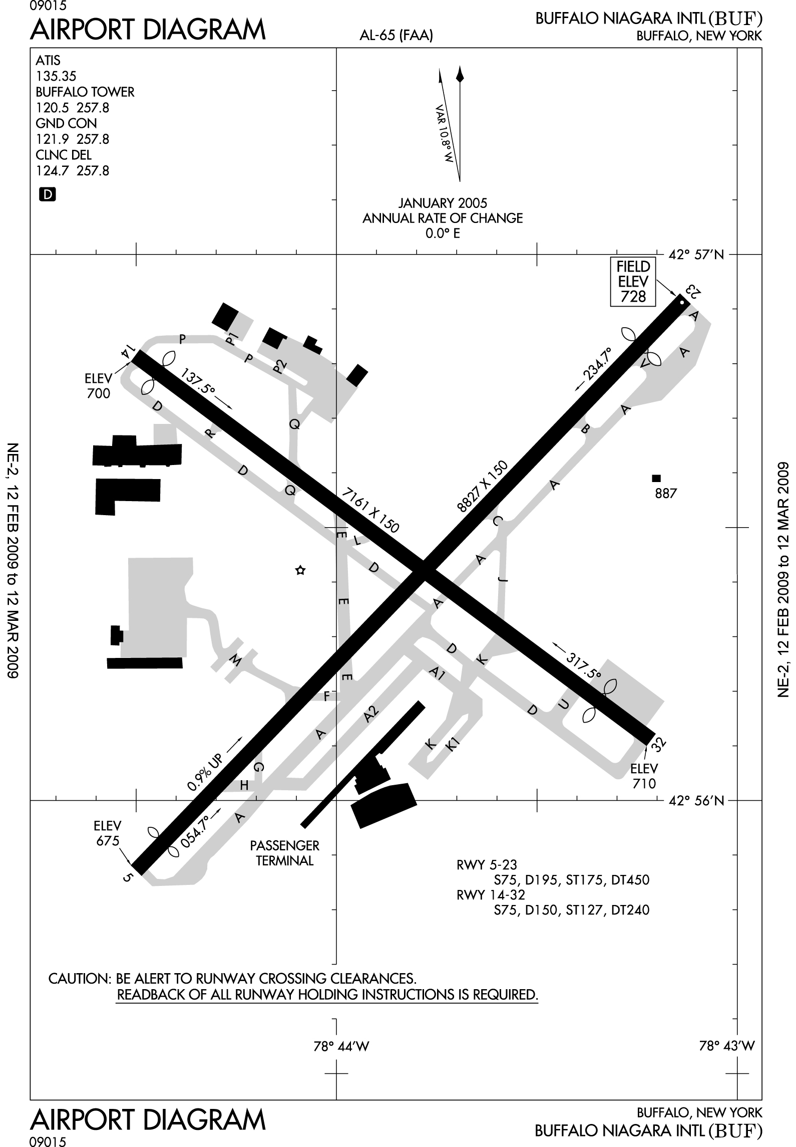 Diagrama de la FAA de KBUF